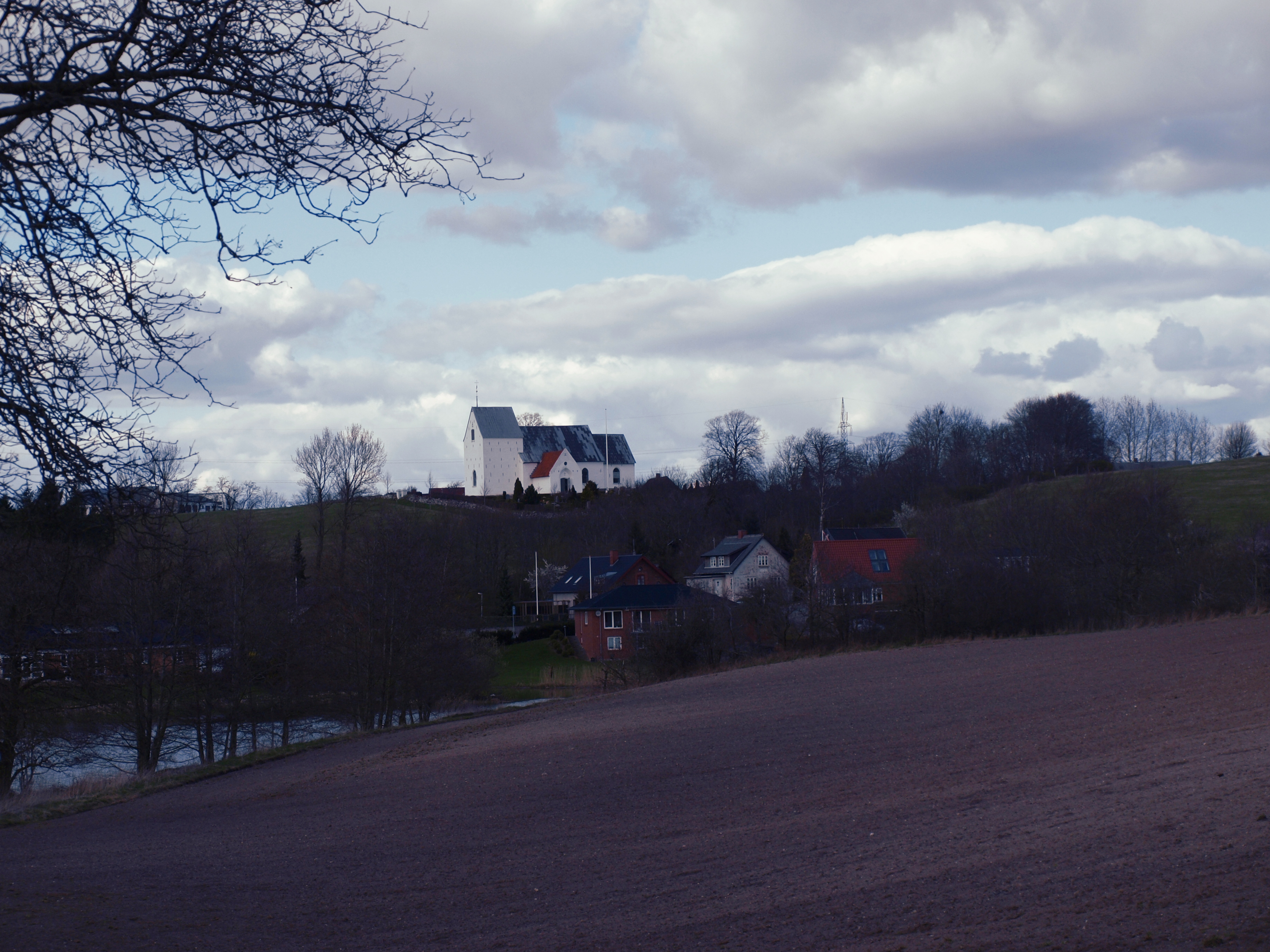 Harte kirke set fra Paaby, 17. april 2015